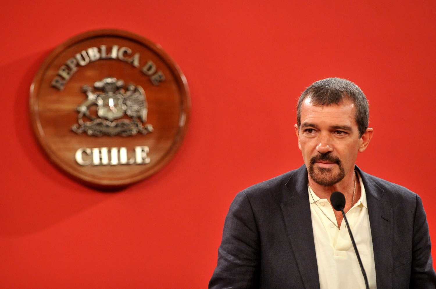 Lanzamiento Película "Los 33"